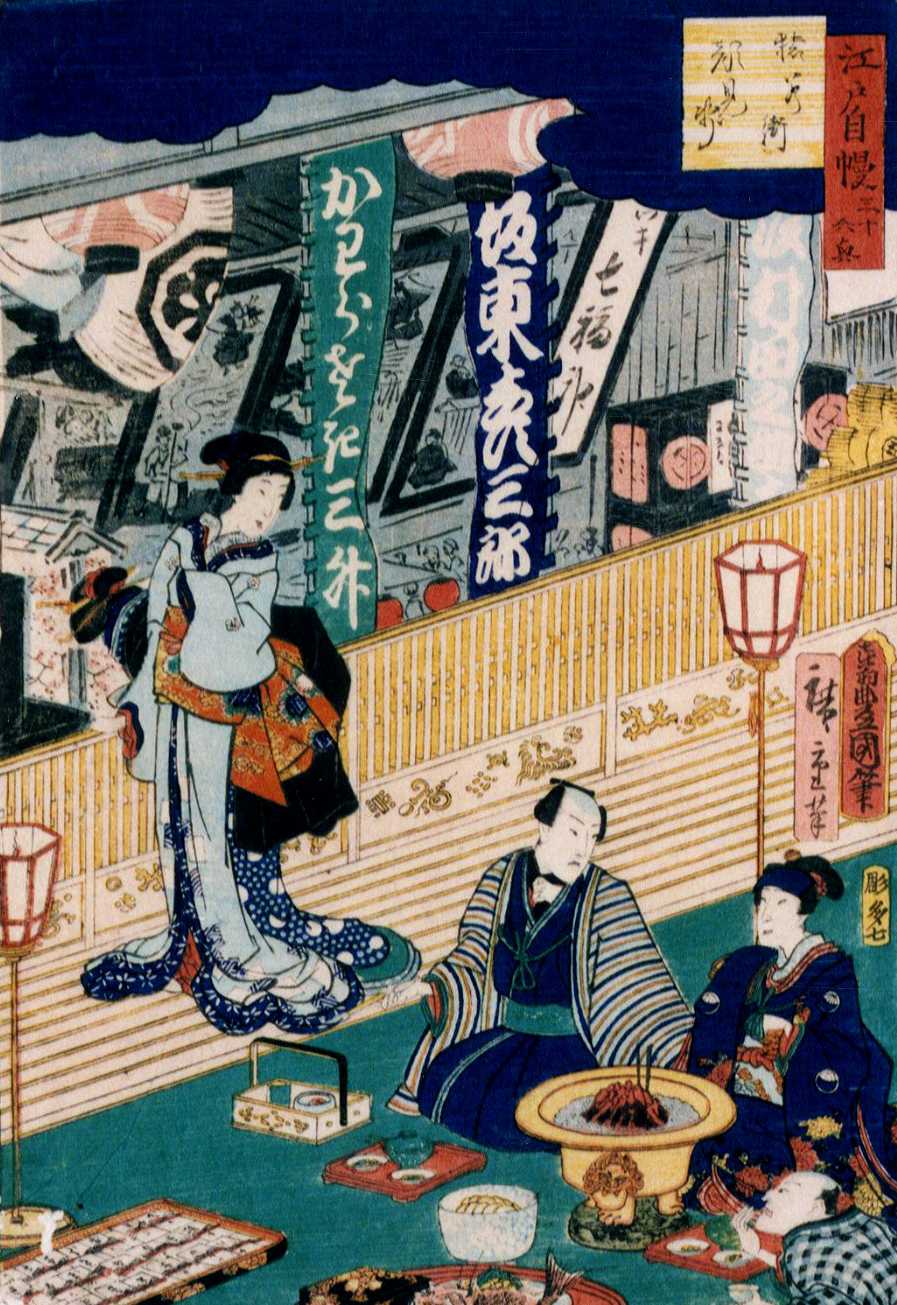 ja: 歌川廣重・三代目歌川豐國 画『江戸自慢三十六興 猿若街顏見せ』 en: Saruwaka-chō Kaomise from Edo-jiman Sanjū-rokkyō, by Hiroshige Utagawa andToyokuni Utagawa III